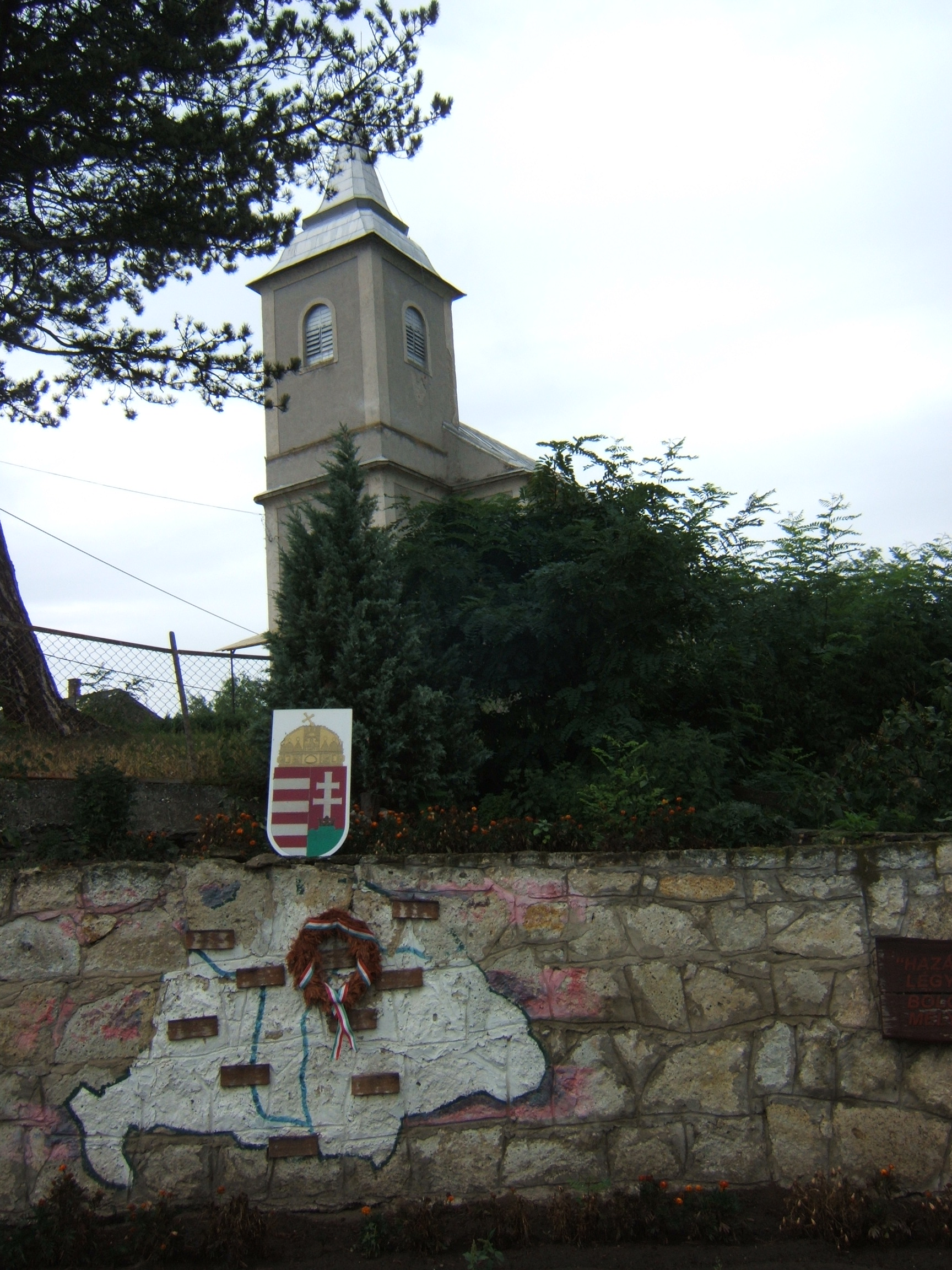 Kisrozvágy, református templom